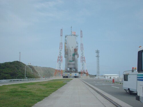 吉信射場 撮影者:Tubame2004 撮影日:2003年4月